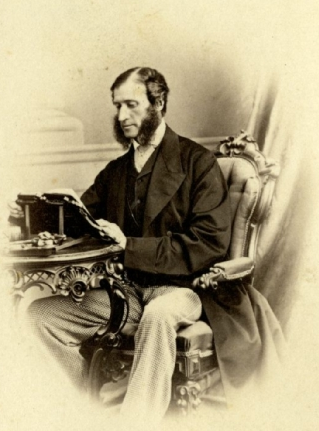 George Dundas